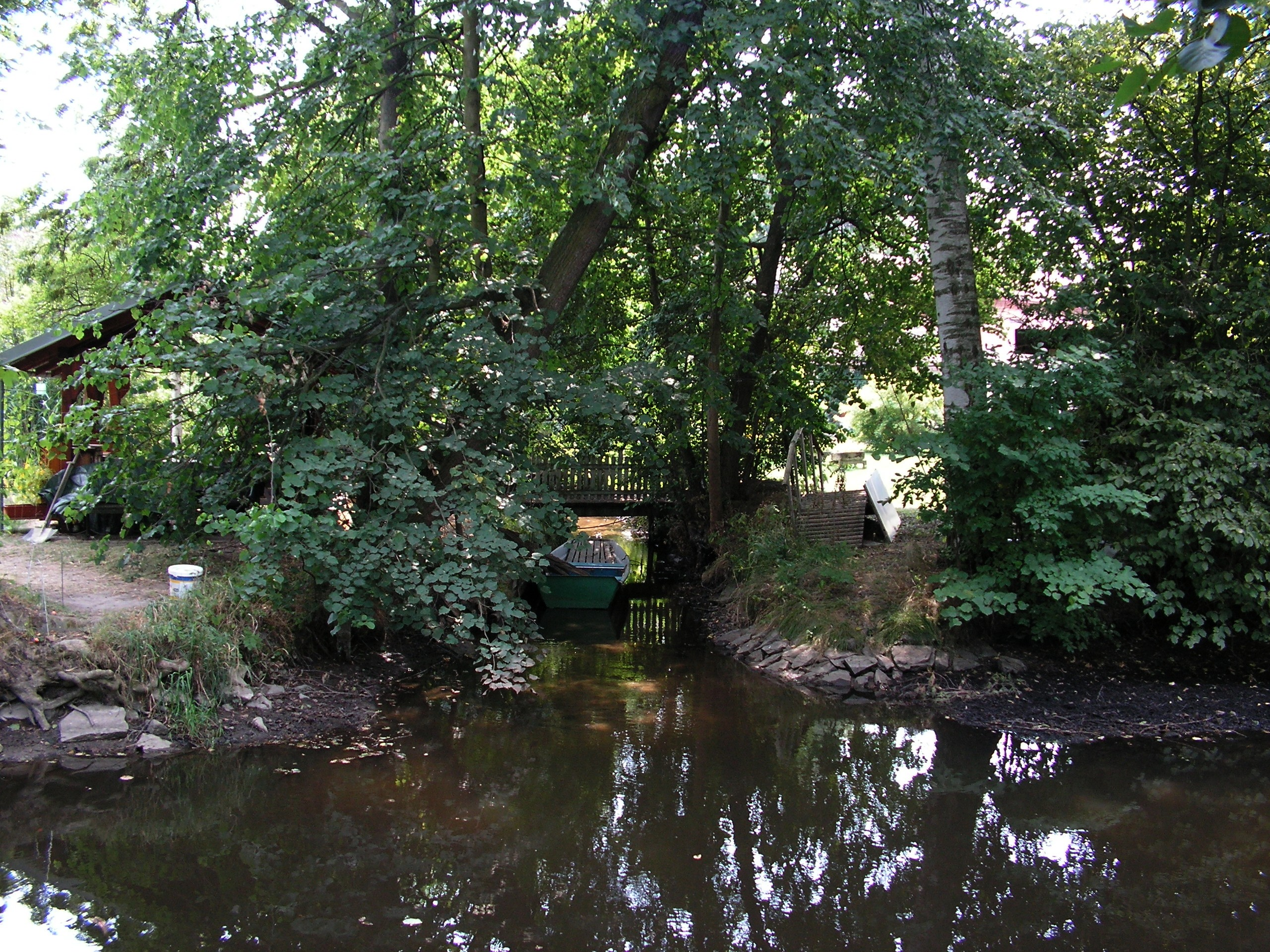 Ústí náhonu Alba do řeky Dědiny v Třebechovicích pod Orebem